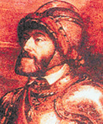 Retrato de Carlos V